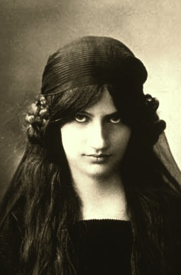 Jeanne Hébuterne (1898-1920)